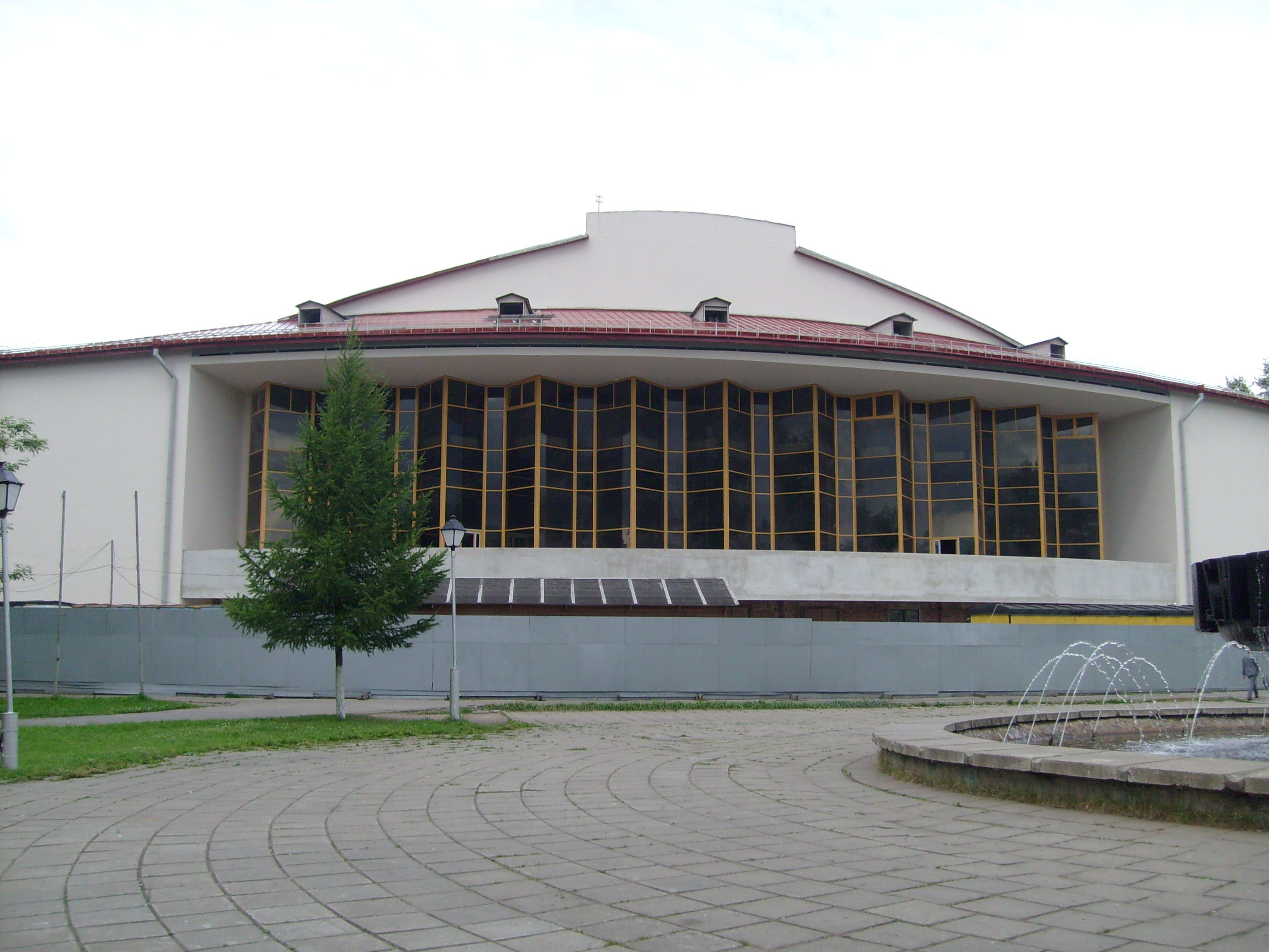 Архангельский театр драмы имени М. В. Ломоносова